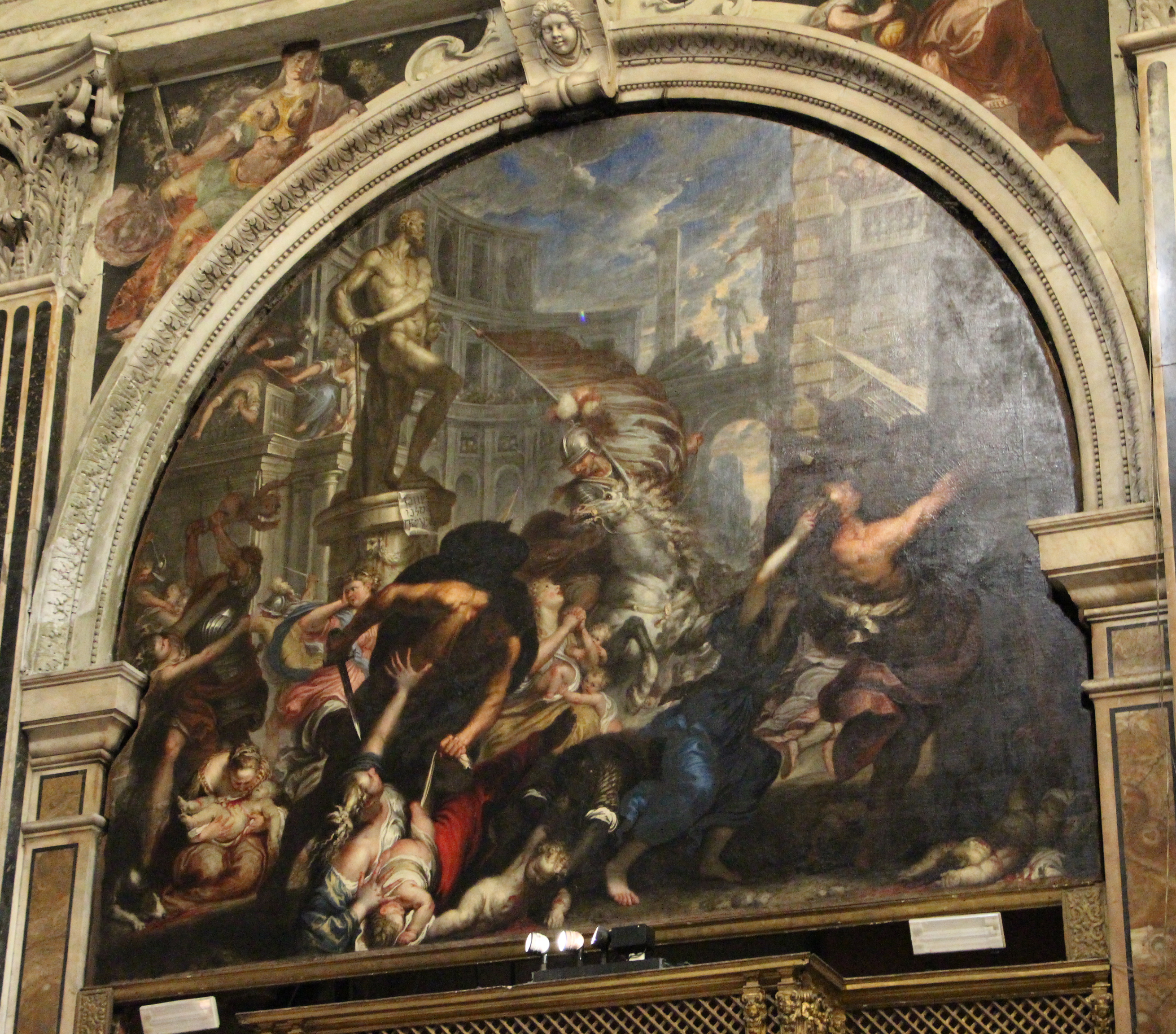 Chiesa del Gesù e dei Santi Ambrogio e Andrea (Genova) The making of this document was supported by Wikimedia CH. (Submit your project!) For all the files concerned, please see the category Supported by Wikimedia CH.